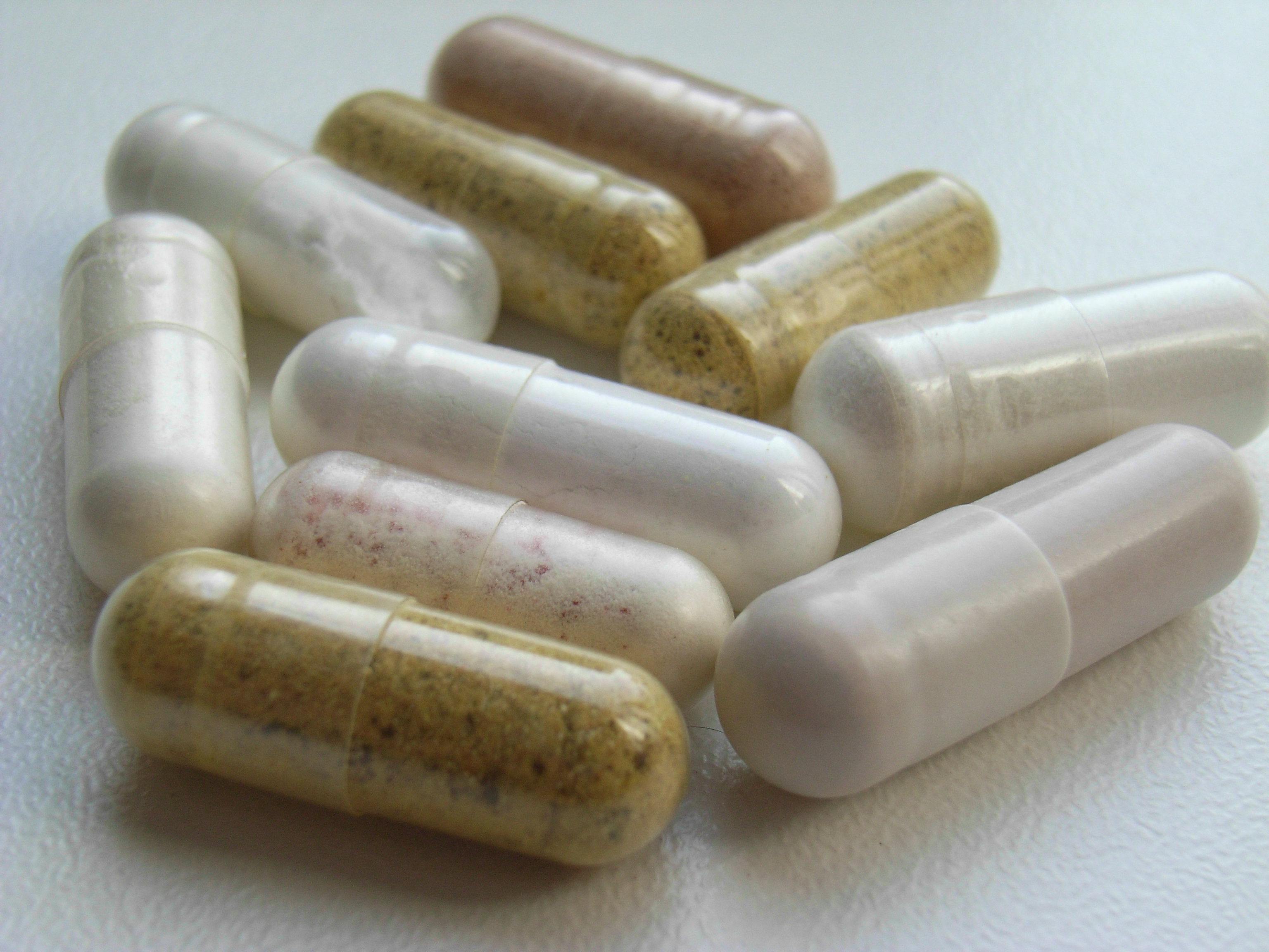 Zelfgemaakte foto van eigen capsules